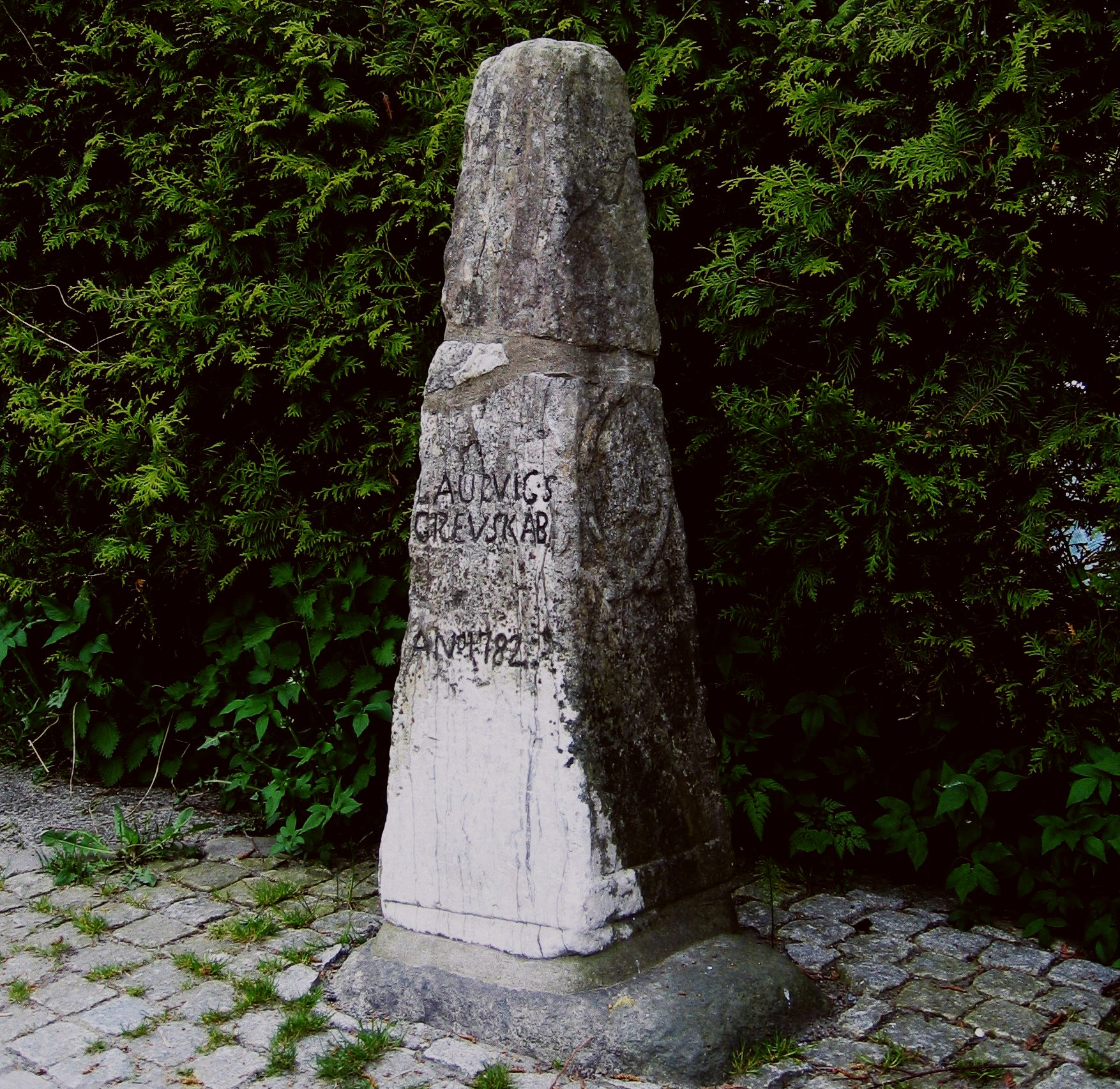 Minnestein i Helgeroa, ved oppkjøring fra havna.